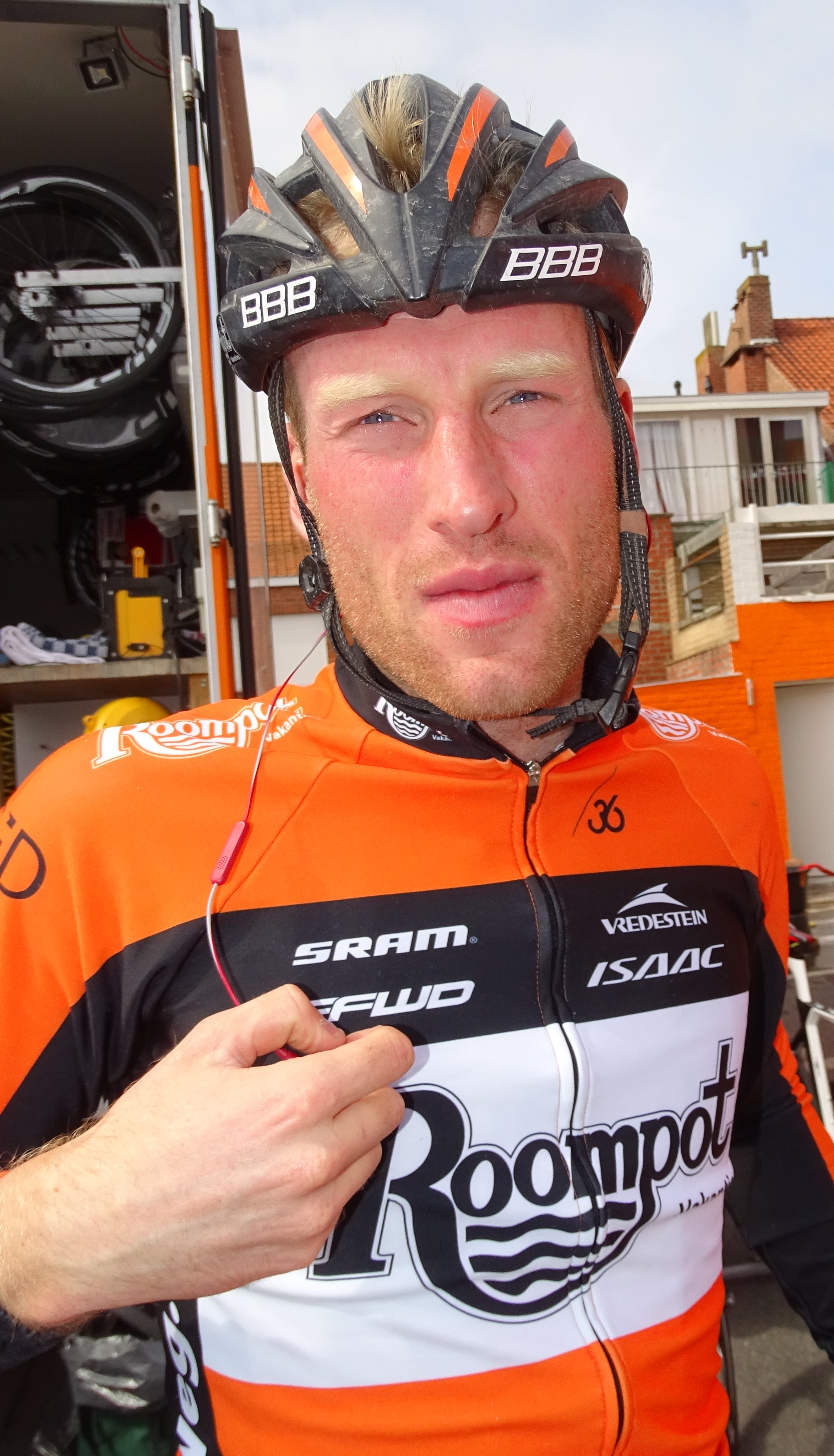 Reportage réalisé le mardi 31 mars à l'occasion du contre-la-montre individuel de la troisième étape secteur b des Trois jours de La Panne 2015 à La Panne, Belgique.